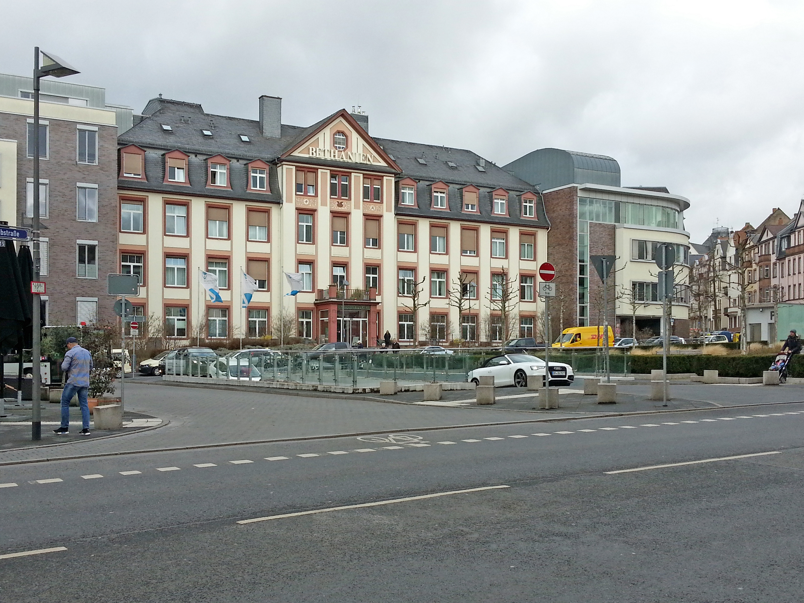 Das Bethanien-Krankenhaus, Im Prüfling, 2017 in Frankfurt am Main-Bornheim.